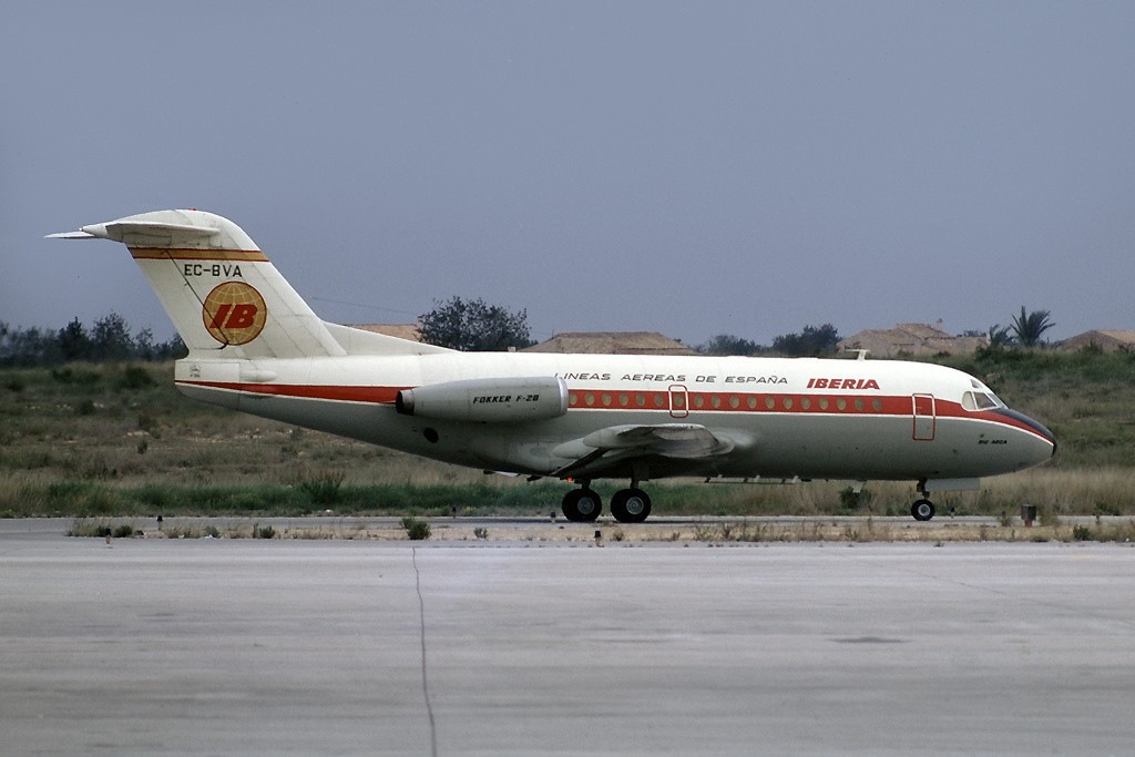 EC-BVA (cn 11017) Rare shot of the first of three Fellowships briefly operated by Iberia - delivered 4.70 but wfu at MAD 1.74. Went back to Fokker then later Burma Airways as XY-ADV, Horizon as N802PH and various Argentine operators as LV-WZC. Stored at EZE. Scan revived from a badly damaged scrap of unmounted Kodachrome that was abandoned for years off the start of a roll